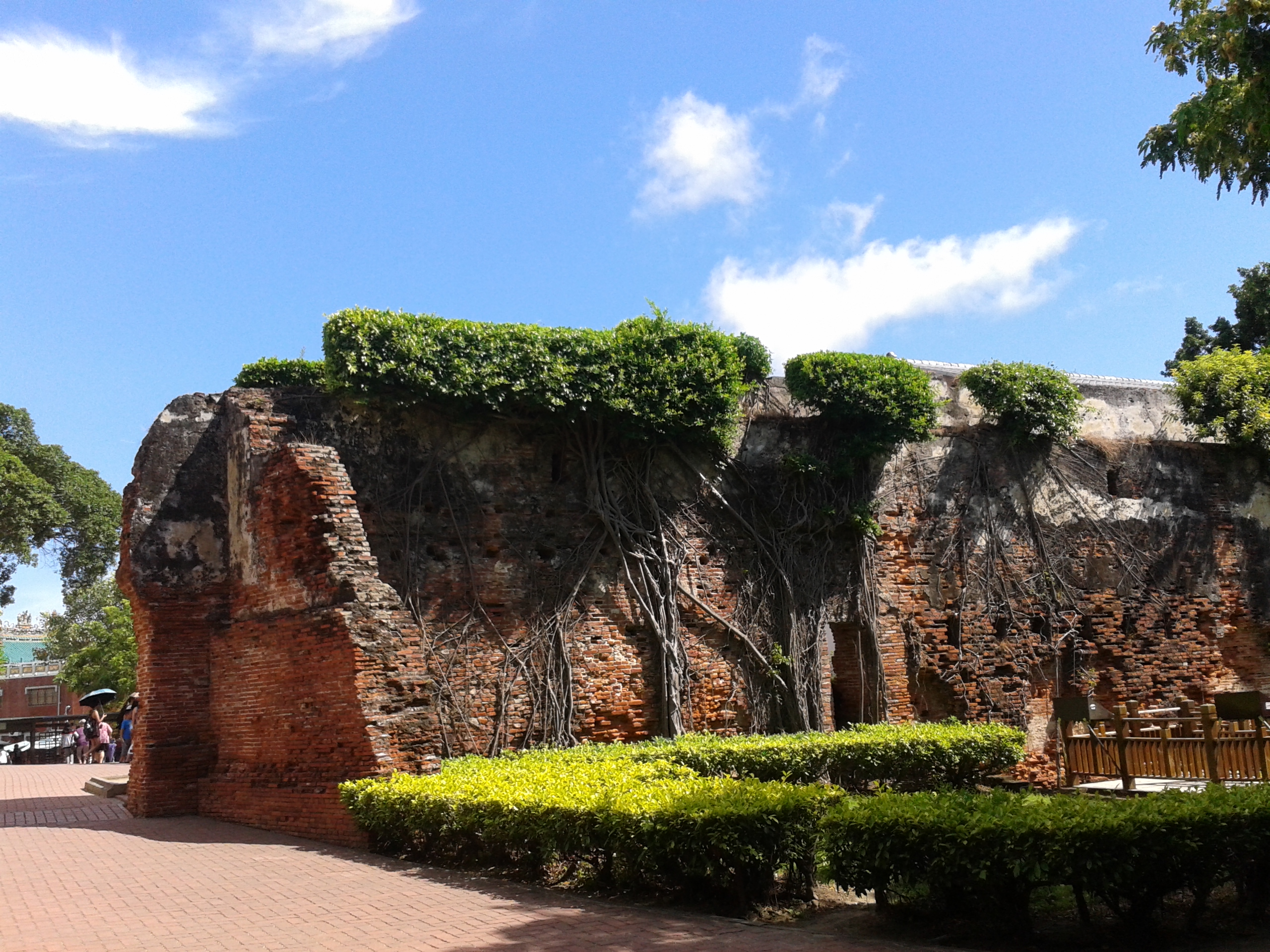 安平古堡 熱蘭遮城遺跡 Fort Zeelandia Remains